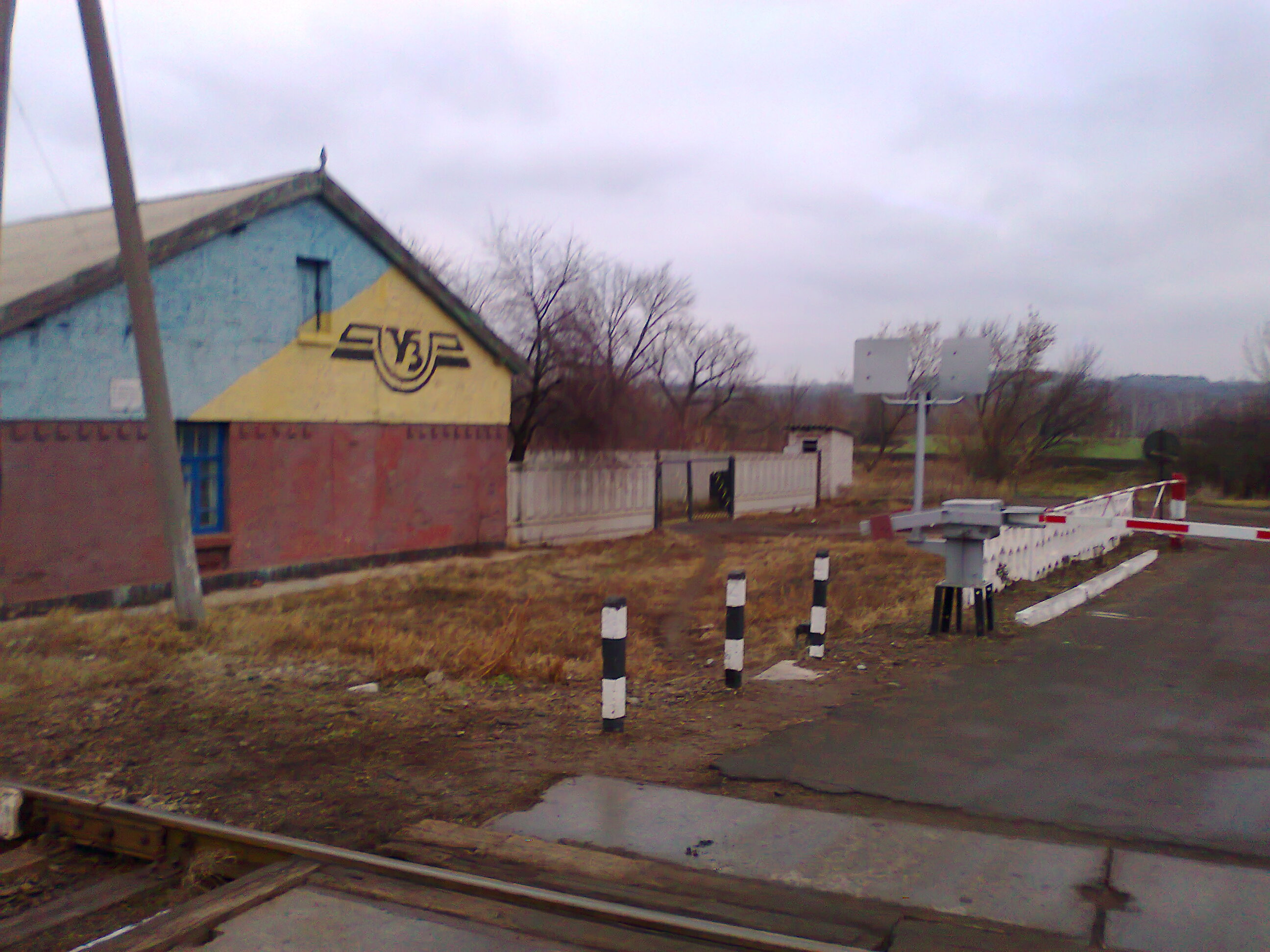 Памятник истории (история 2 мировой войны)